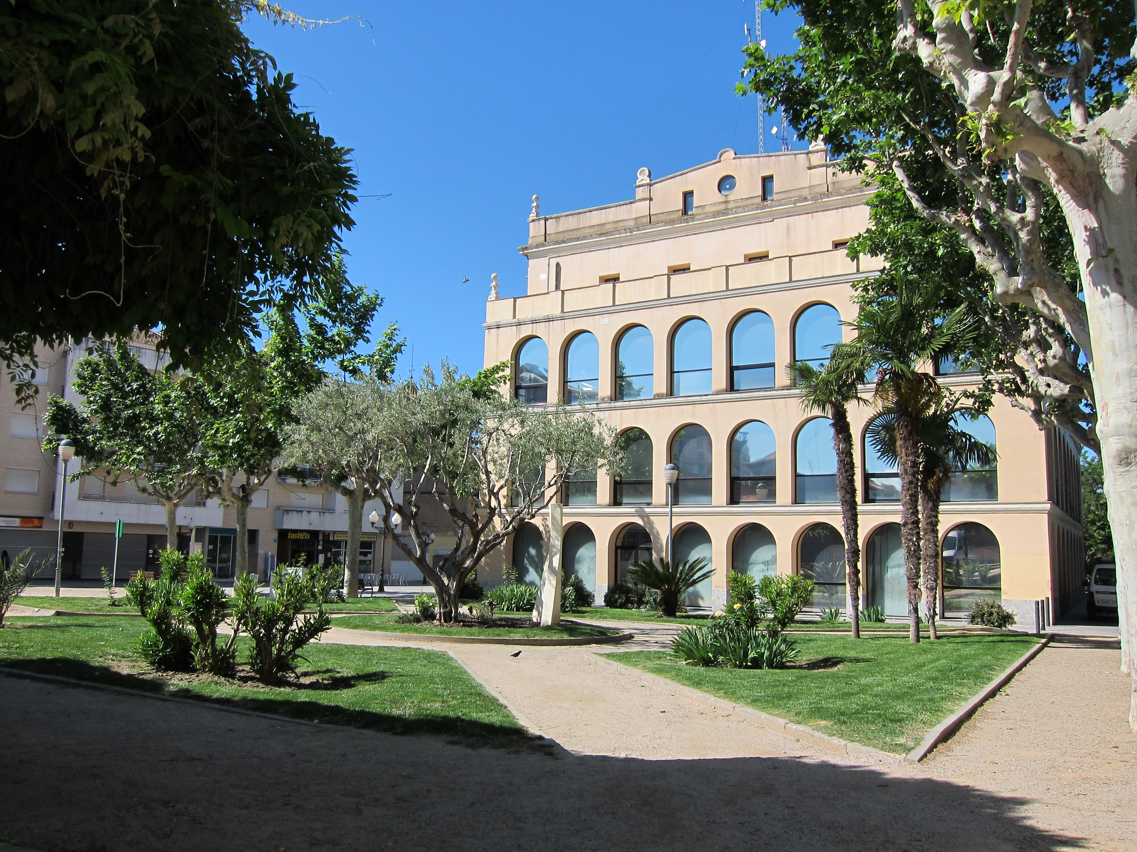 Ajuntament d'Olesa de Montserrat